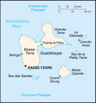 Landkarte von Guadeloupe